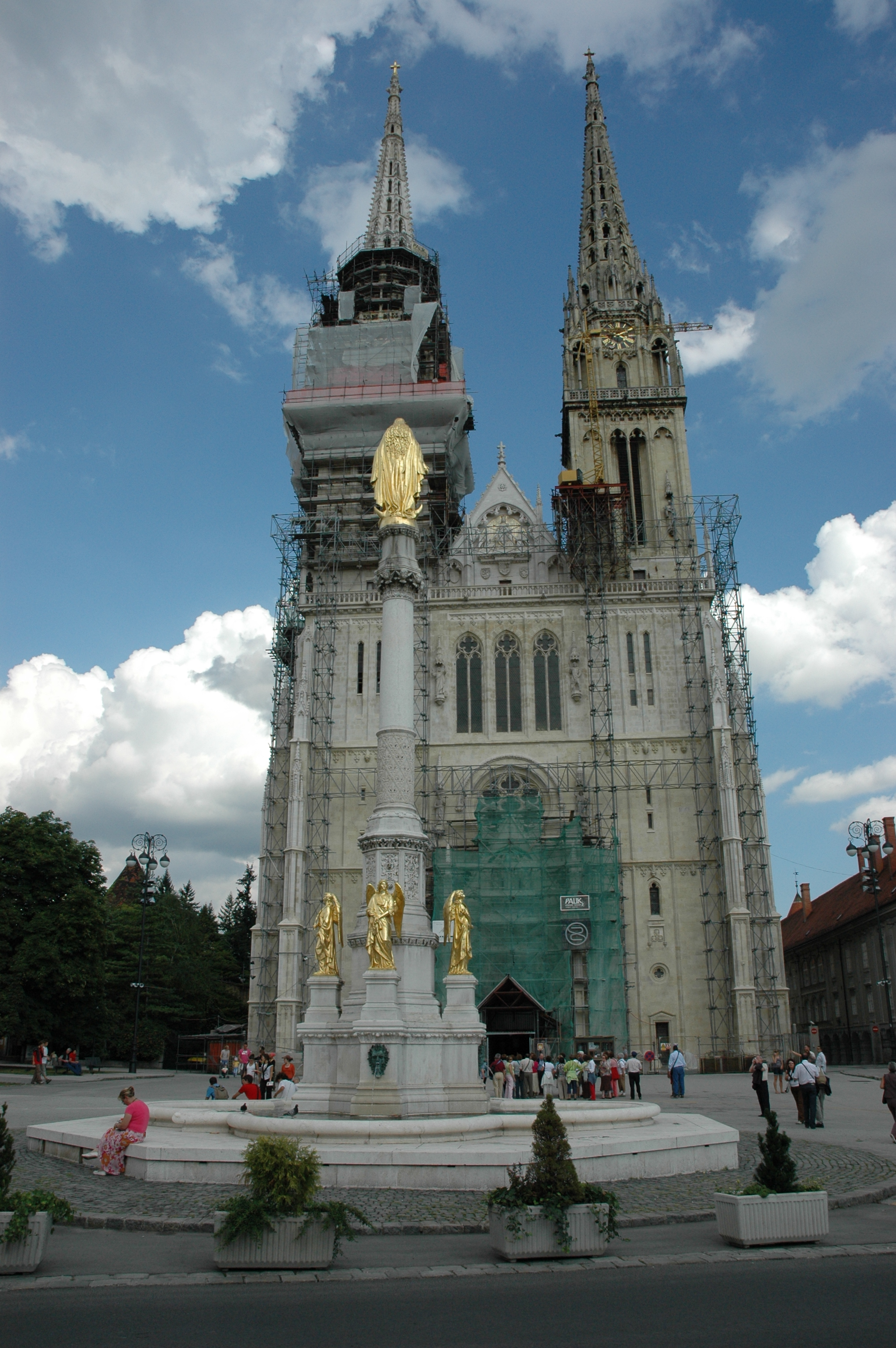 Catedral de Zagreb